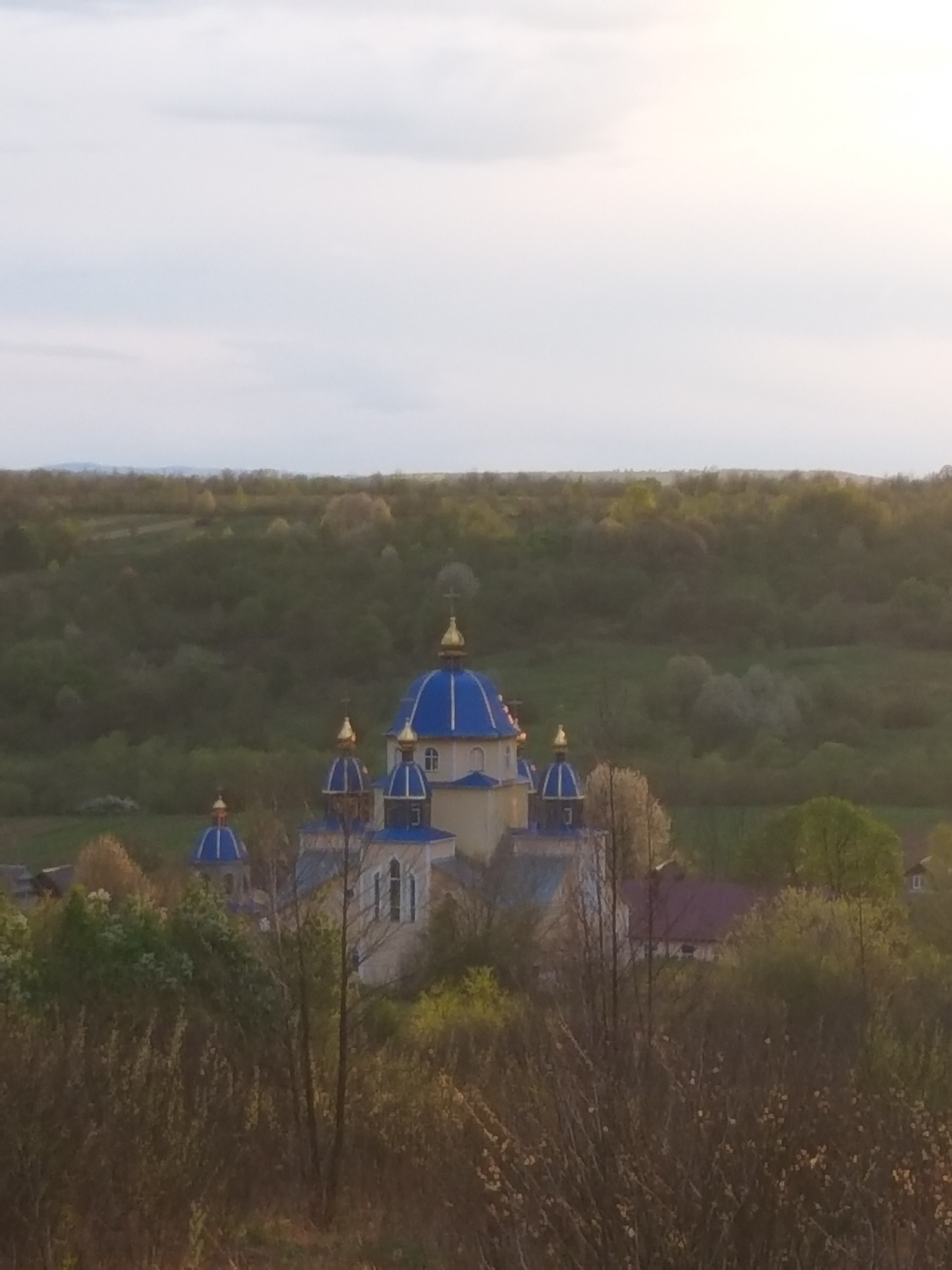 Фотографія